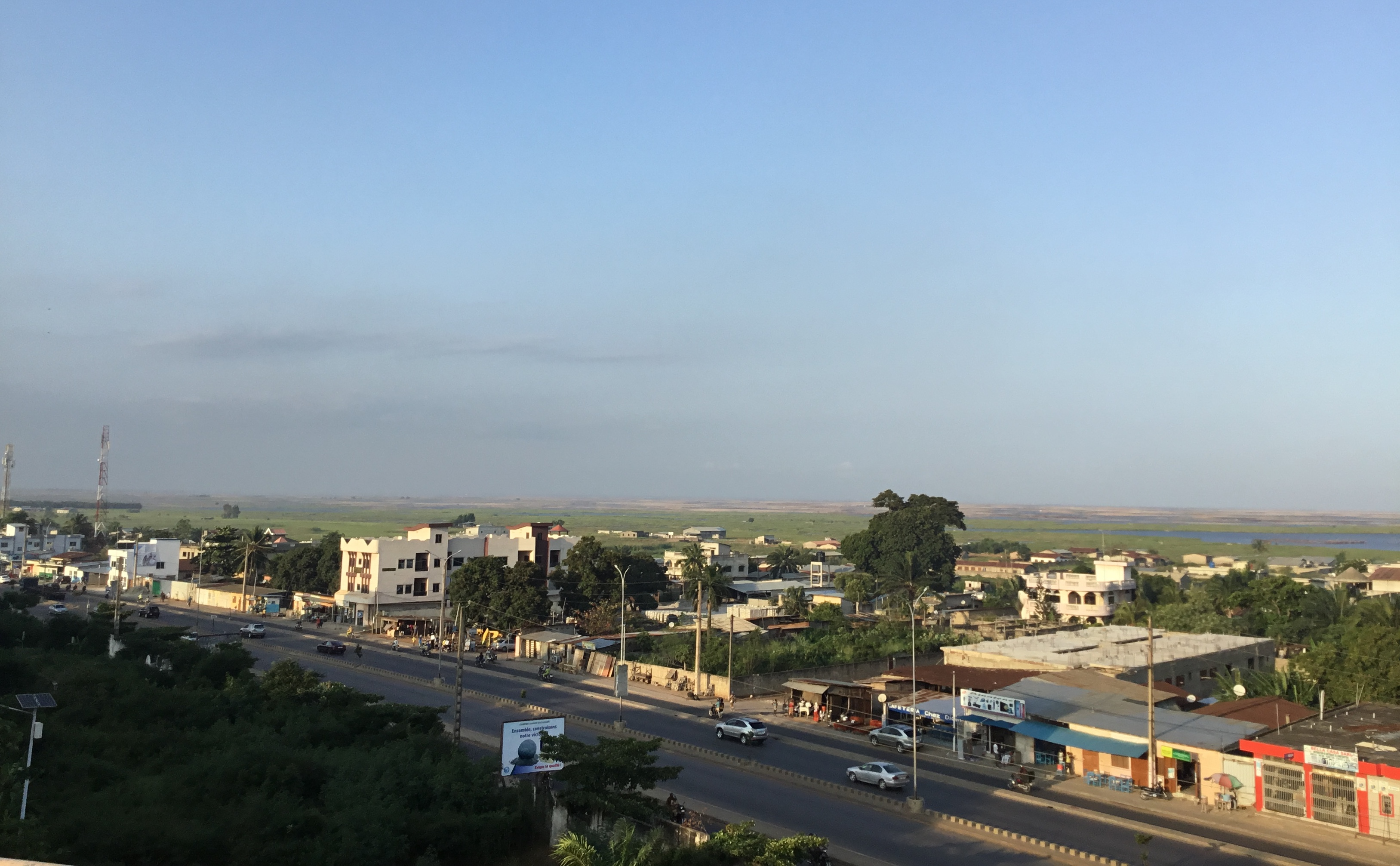 Abomey-Calavi vue